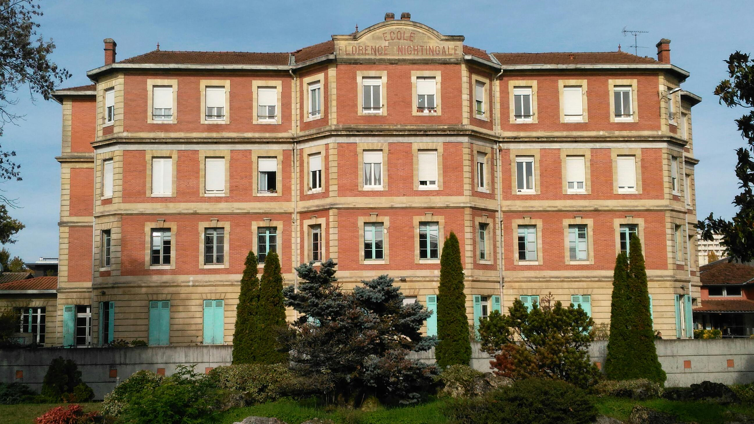 Façade sud de l'Institut Florence Nightingale, à Talence, propriété de la Fondation Bagatelle (Maison de Santé Protestante de Bordeaux), érigé en American Nurses Memorial lors de sa construction en 1921.